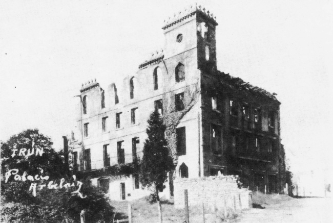 Palacio de Arbelaiz (tas el incendio de 4 de septiembre de 1936)